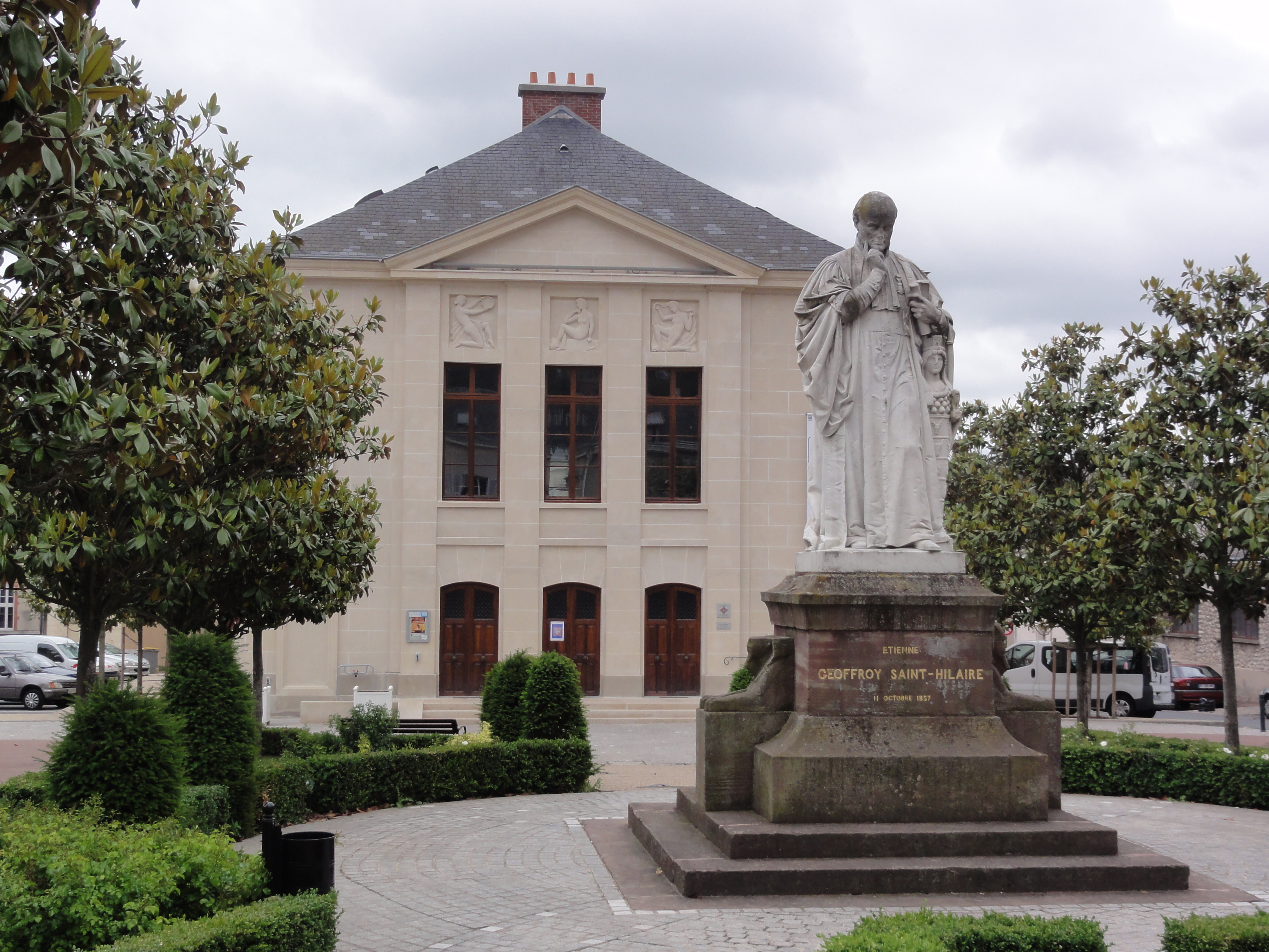 Étampes, théatre et statue d'Étienne Geoffroy Saint-Hilaire, par Élias Robert